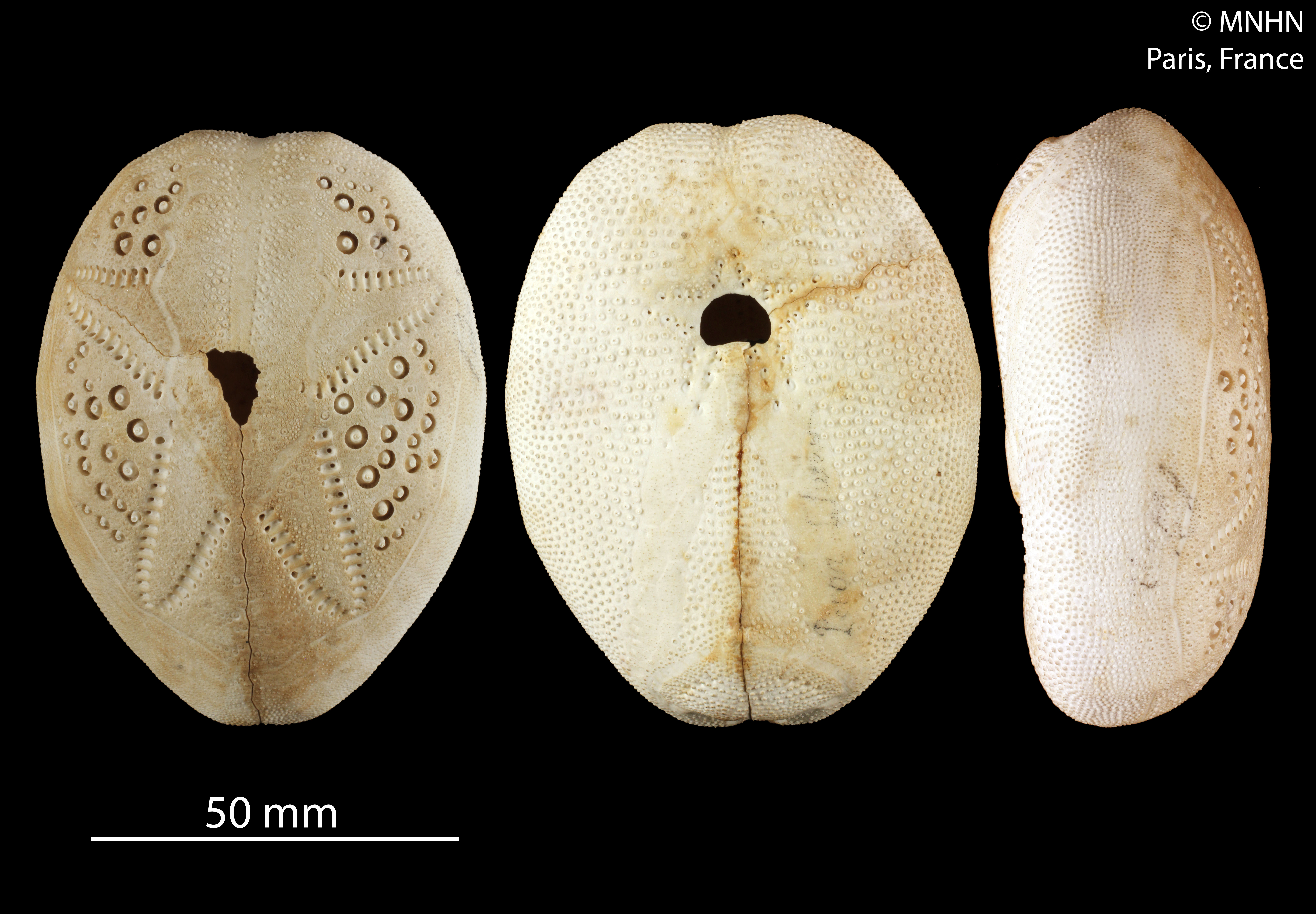 Breynia australasiaeLot de 2 spécimens MNHN-IE-2013-10417Collection : Échinodermes (IE)Muséum National d'Histoire Naturelle (Paris, France) Origine : Libellé du pays : OCEAN AUSTRAL Localité/Lieu-dit : Océan austral Nom du collecteur : Péron & Lesueur